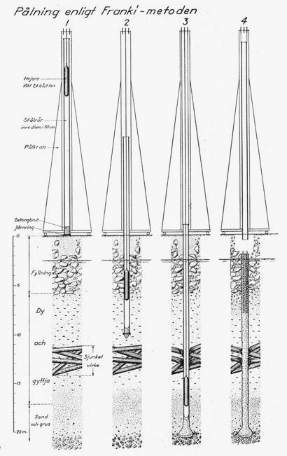 Grundläggning vid Slussen i Stockholm medelst pålning enligt system Franki